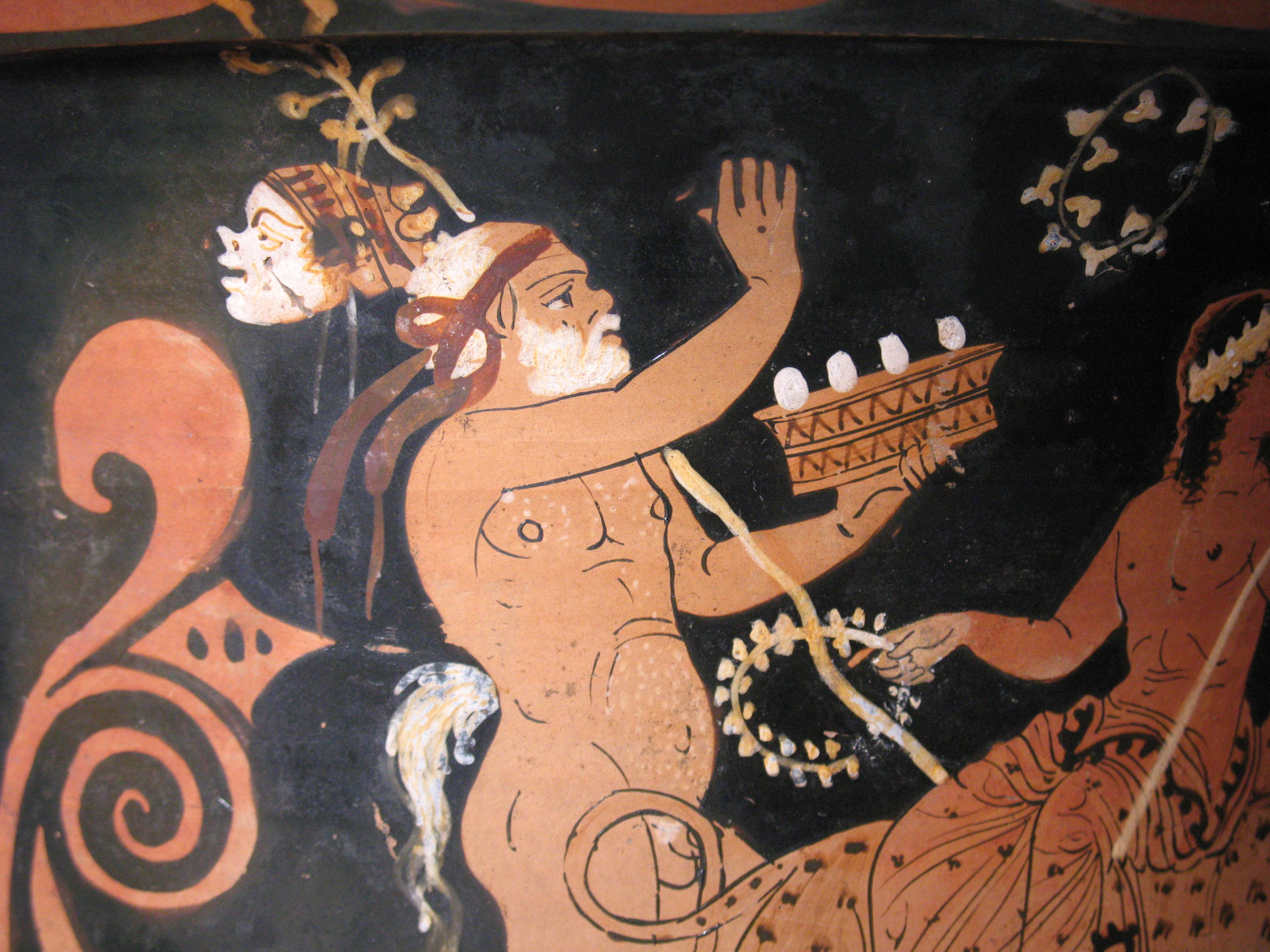 Cratère en cloche proto paestan du Peintre du Louvre K 240, détail: papposilène. Paris, musée du Louvre.